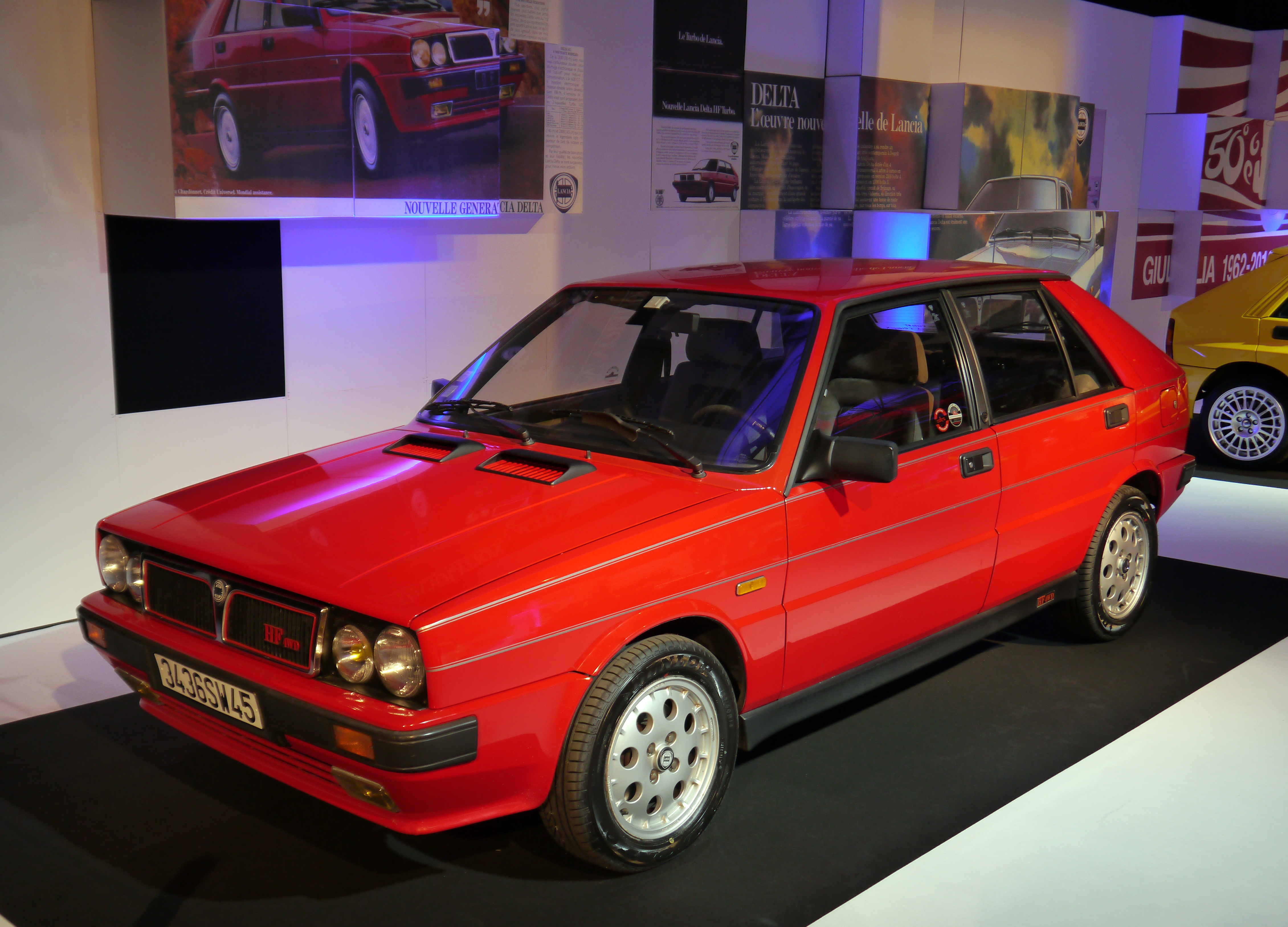 1987 Lancia Delta HF 4WD - Designed by Giorgietto Giugiaro (Ital Design). 4-cylinder 1995 cc turbo engine (165 bhp).